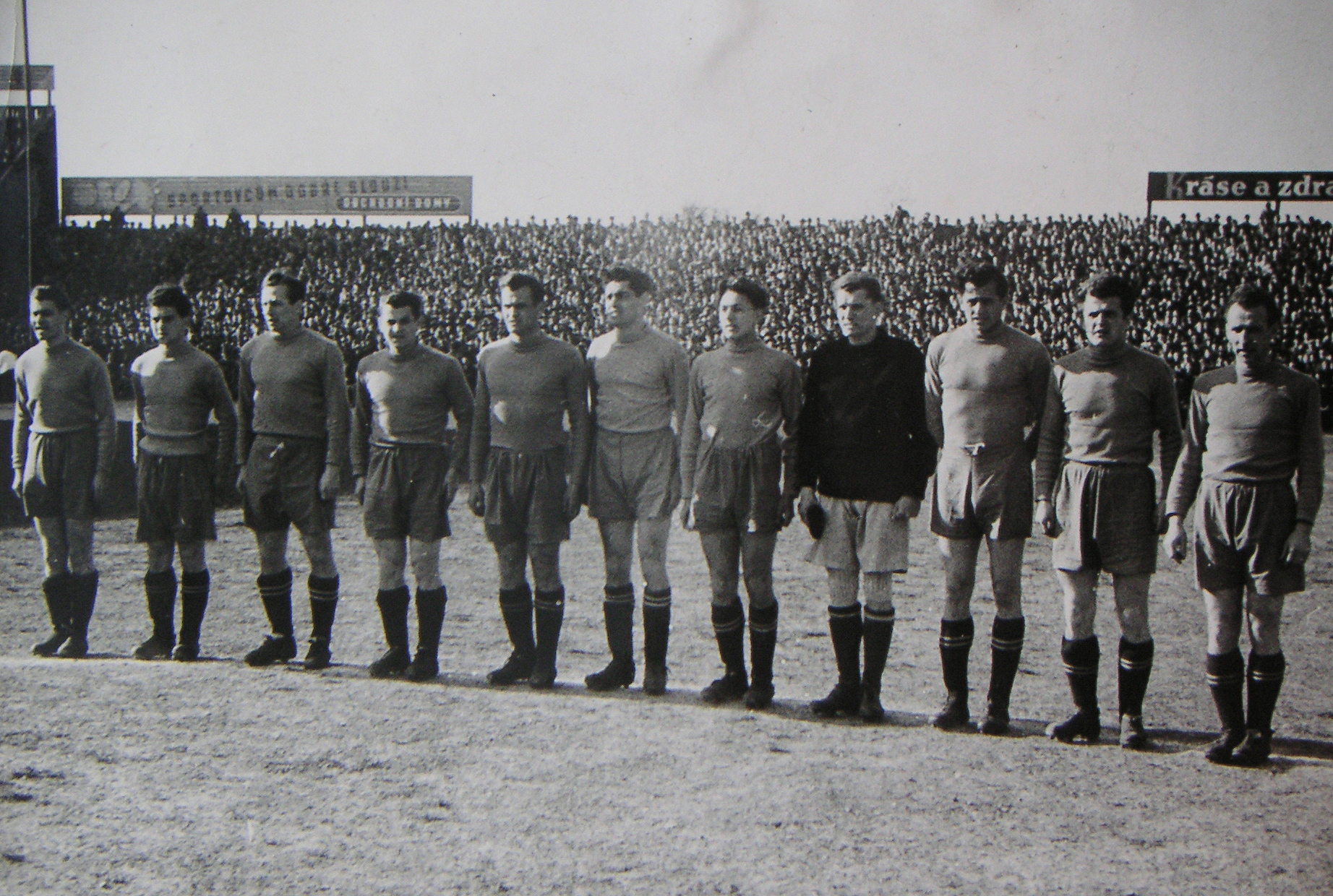 Slovan Bratislava, majster ČSR, 1951